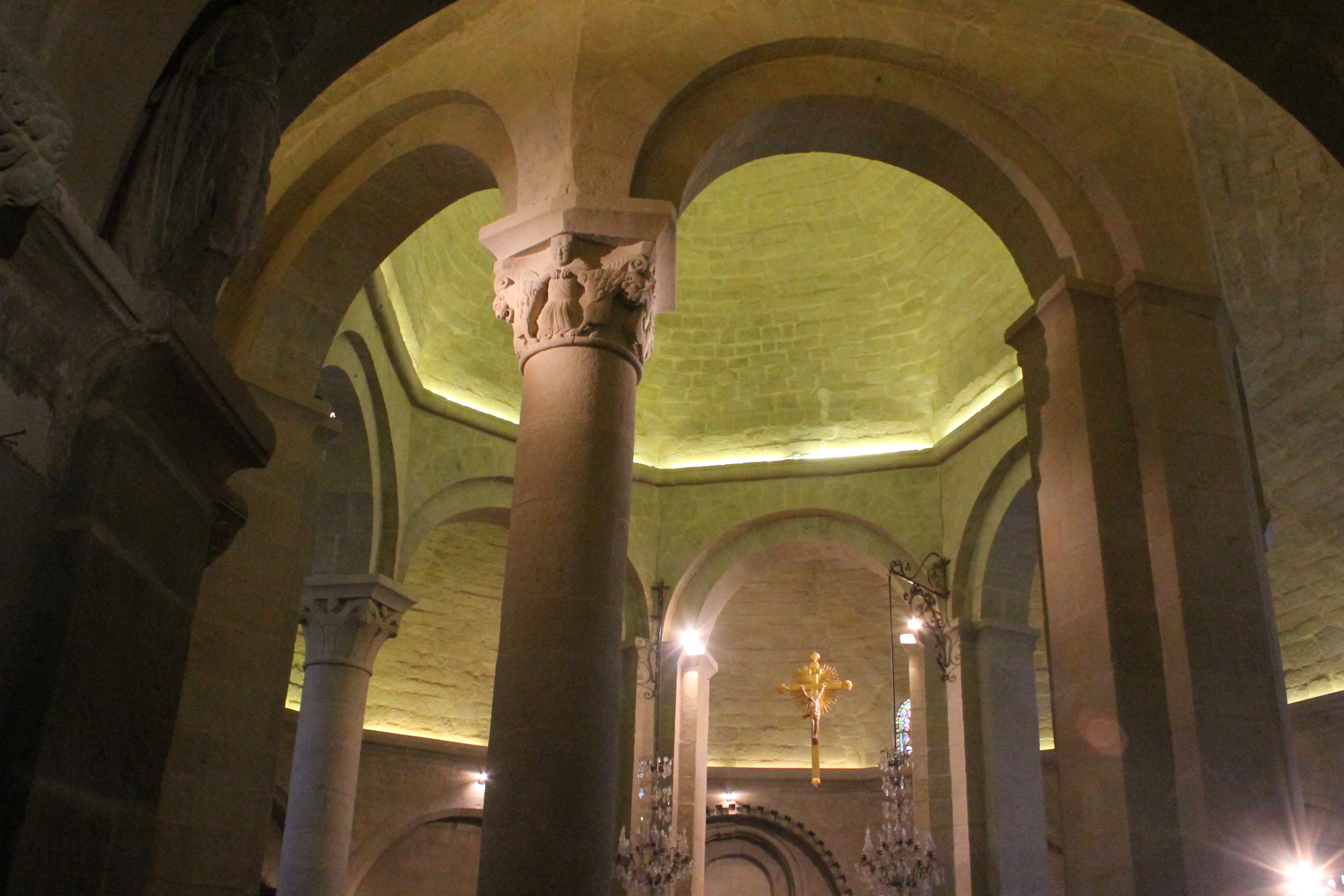 Église de l'Assomption de Rieux-Minervois Elle est édifiée en rotonde qui repose sur un plan heptagonal et possède un chœur à 7 côtés. Ses chapiteaux ouvragés et notamment celui de la Vierge en Gloire sont l'œuvre d'un sculpteur anonyme appelé « Maître Cabestany ».